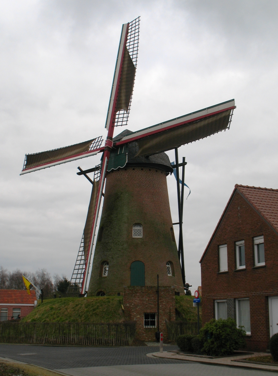 De Stenen Bergmolen te Rijkevorsel, provincie Antwerpen